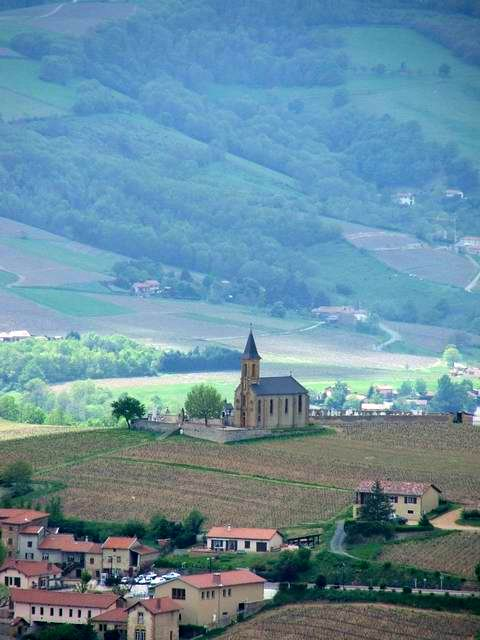 Chapelle de Saint-Laurent-d'Oingt, département du Rhône (69), région Rhône-Alpes, France.La chapelle de Saint Laurent d'Oingt